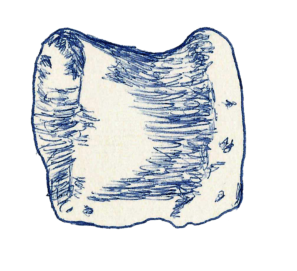 Illustration of a fossil of Embasaurus